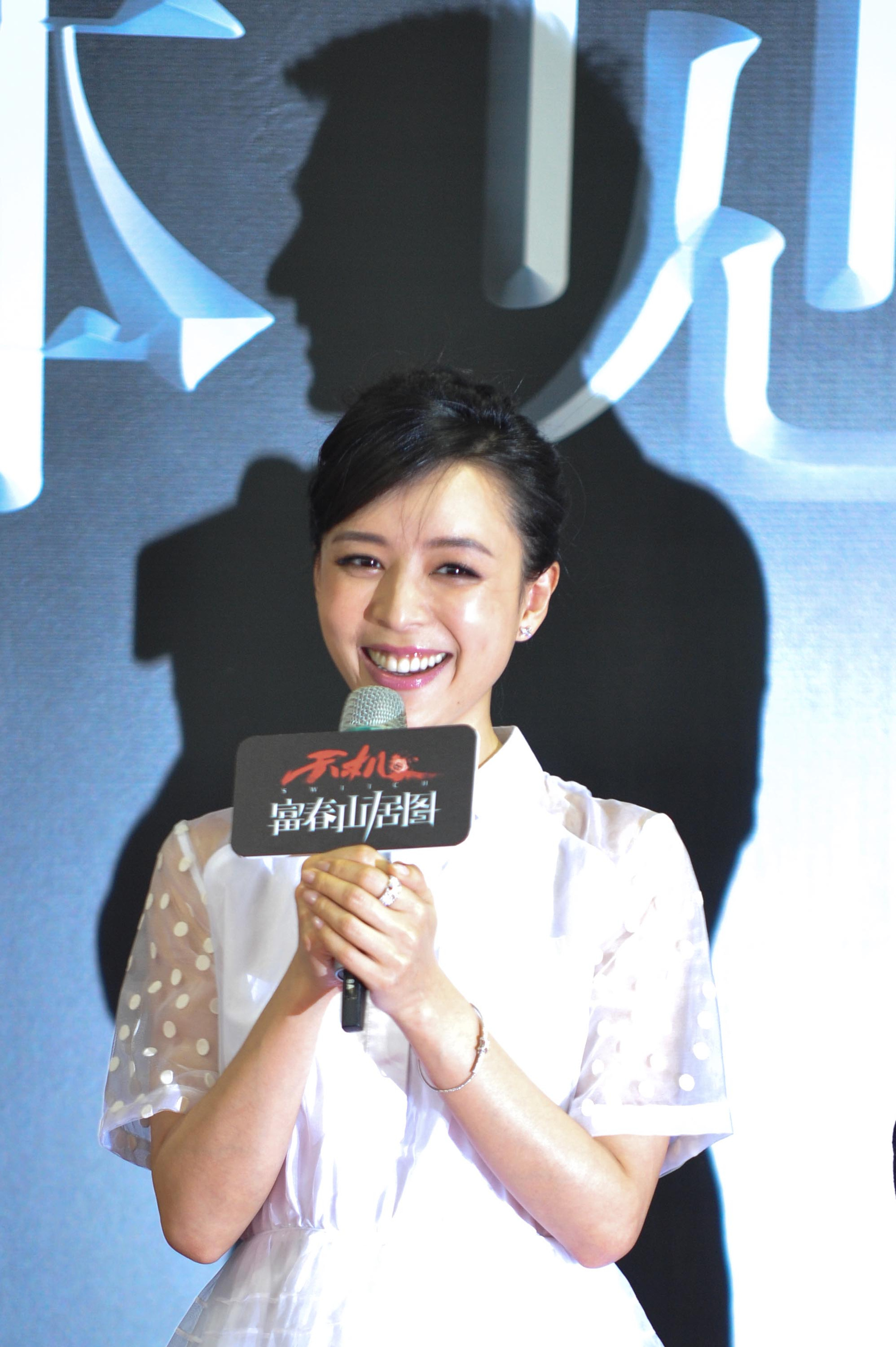 天机富春山居图 (张静初)